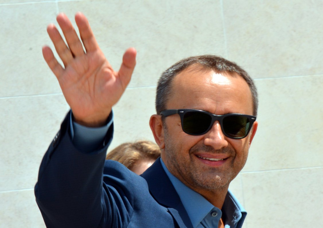 Andreï Zviaguintsev au festival de Cannes